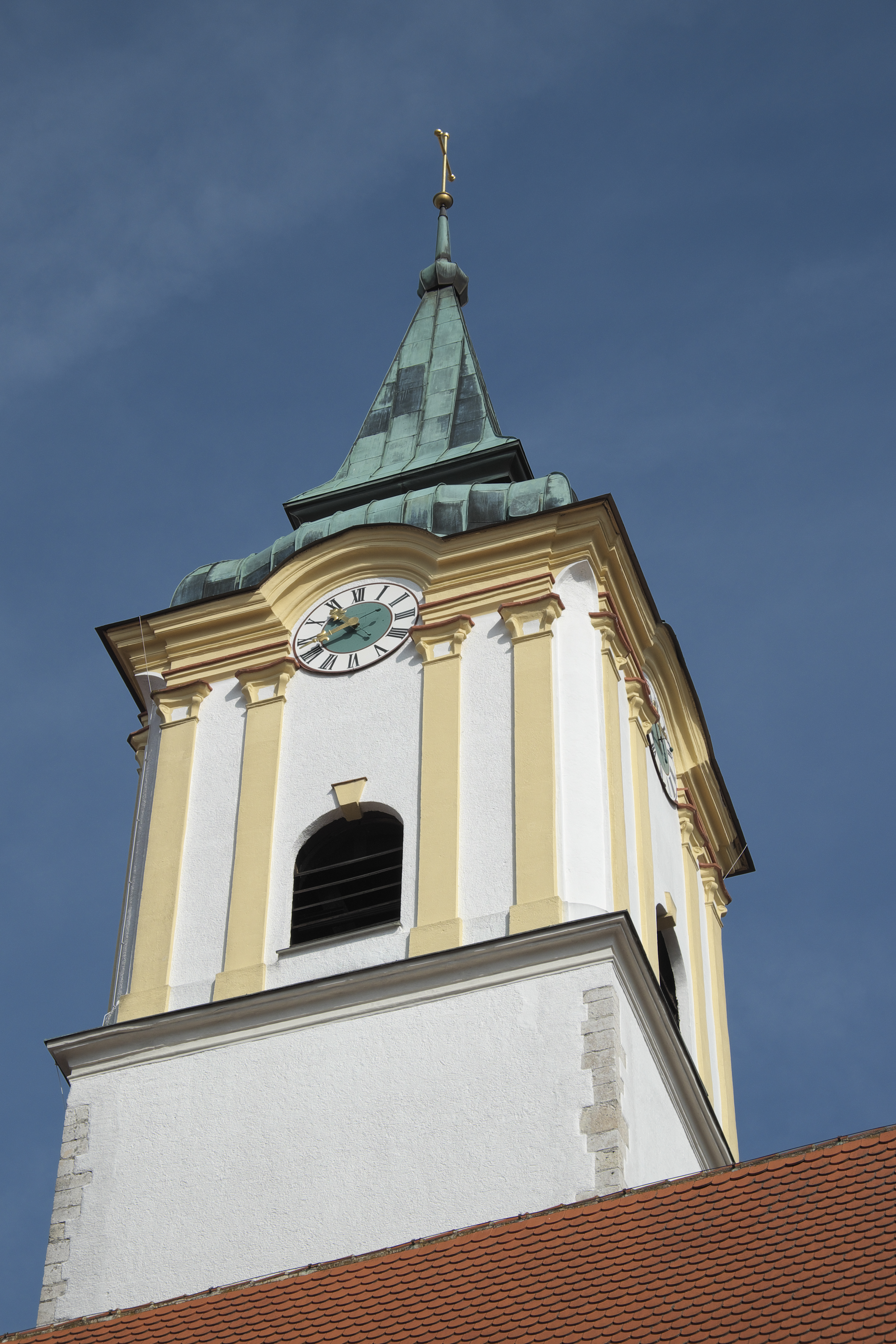 Katholische Pfarrkirche St. Barbara in Abensberg im Landkreis Kelheim in Niederbayern (Bayern), Kirchturm